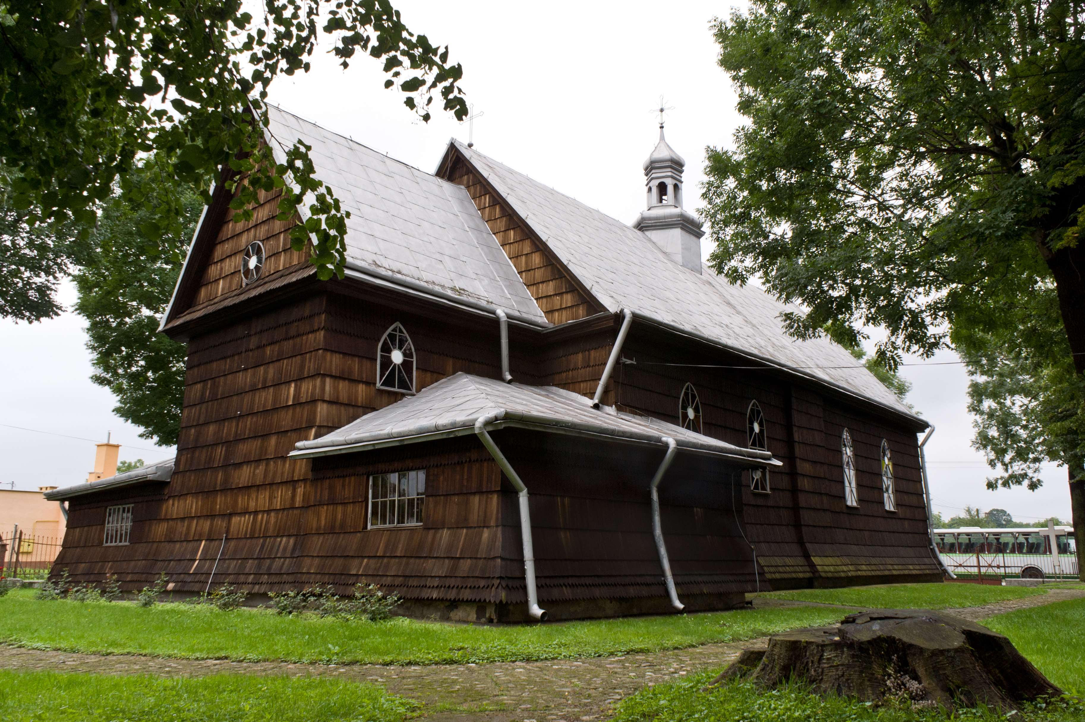 Zabytkowy kościół pw. św. Piotra i św. Pawła w Medyce.